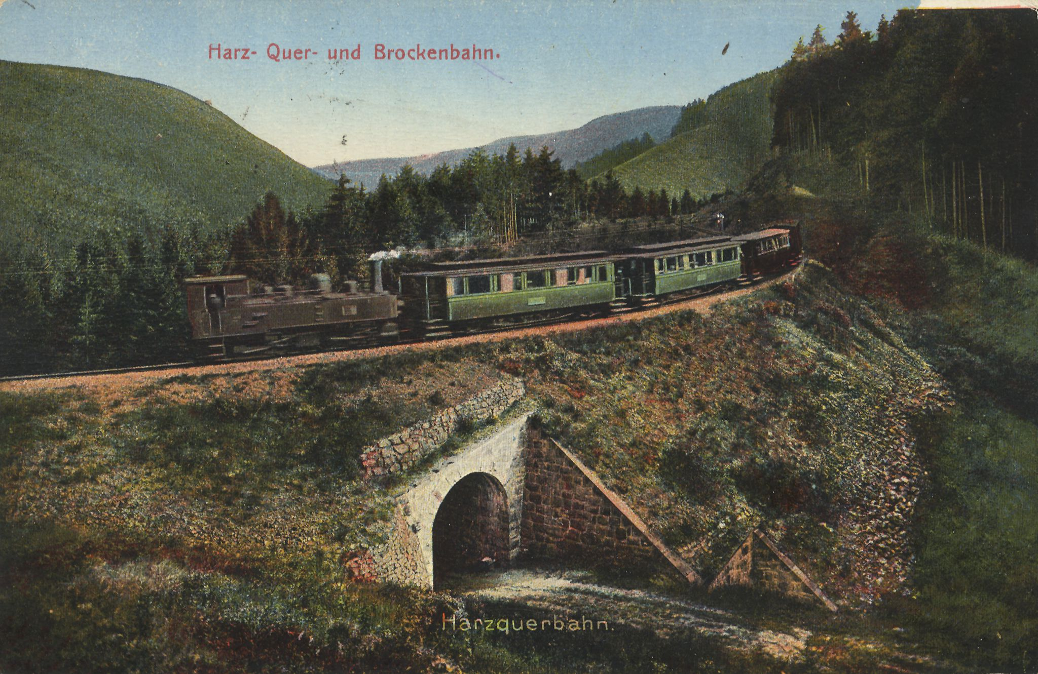 Harzquerbahn